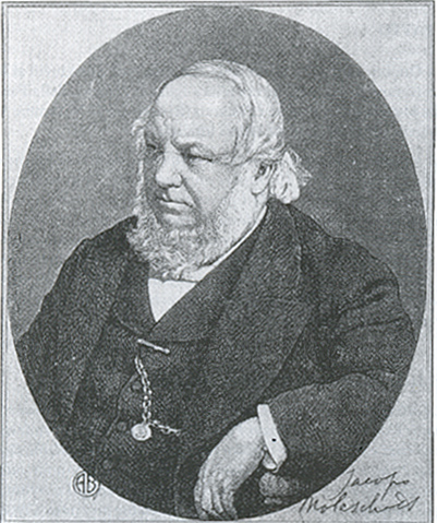 Jakob Moleschott (1822-1893). Zeitgenössischer Druck um 1880.